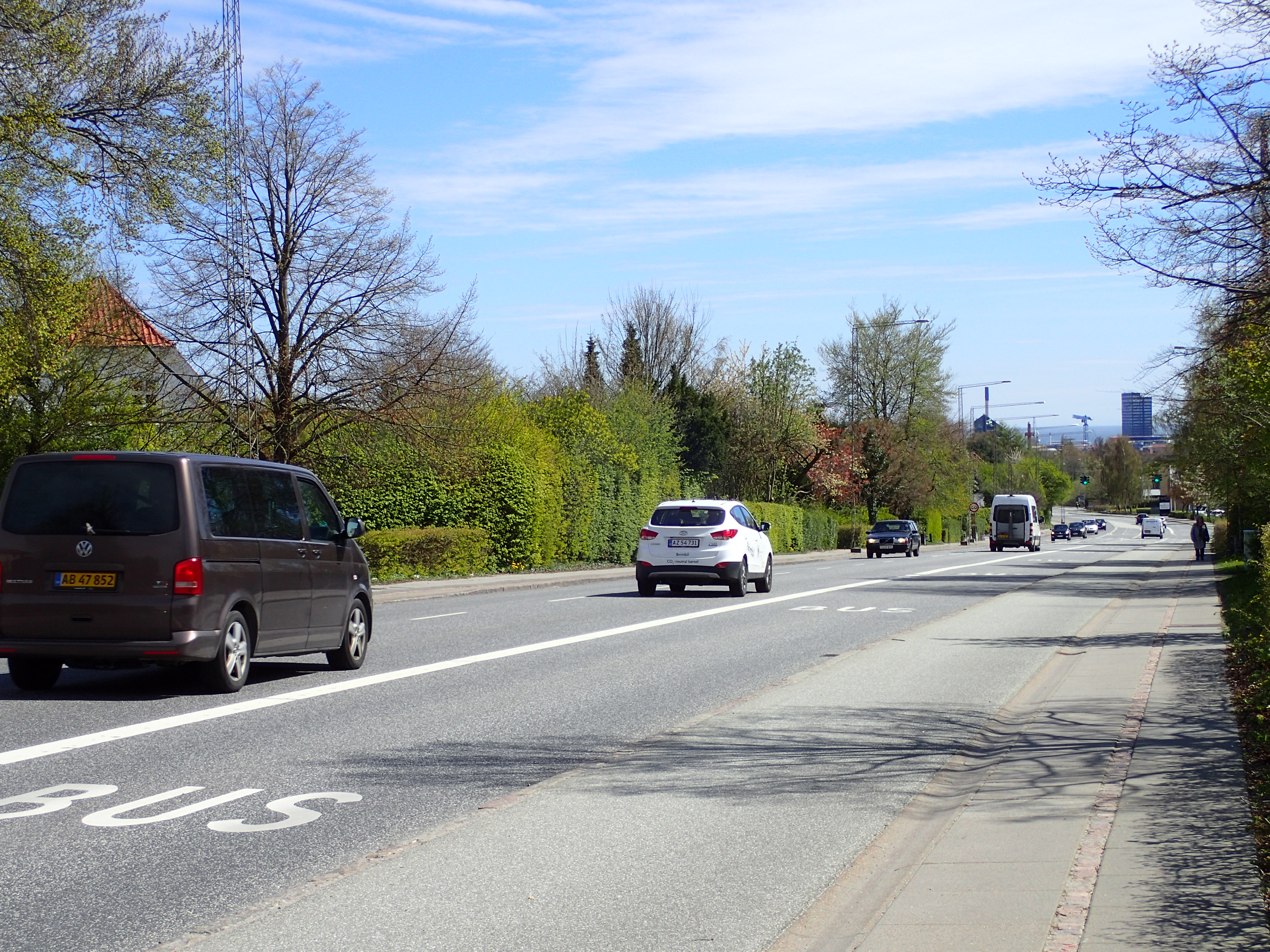 Viborgvej i Hasle, Aarhus V. Kik øst mod Aarhus centrum og Aarhus bugten.